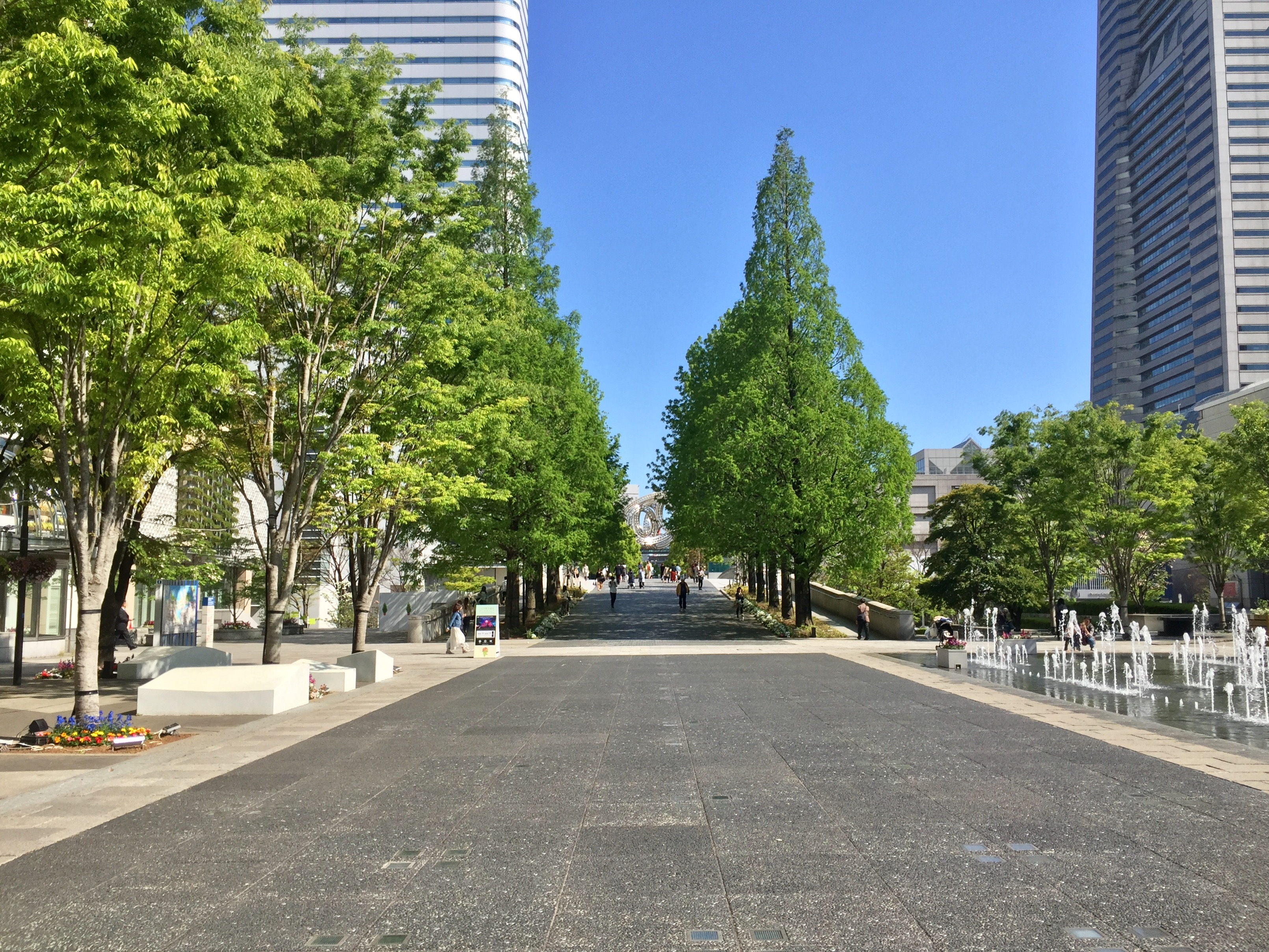 グランモール公園の「美術の広場」にて、ランドマークタワー方面を見る。